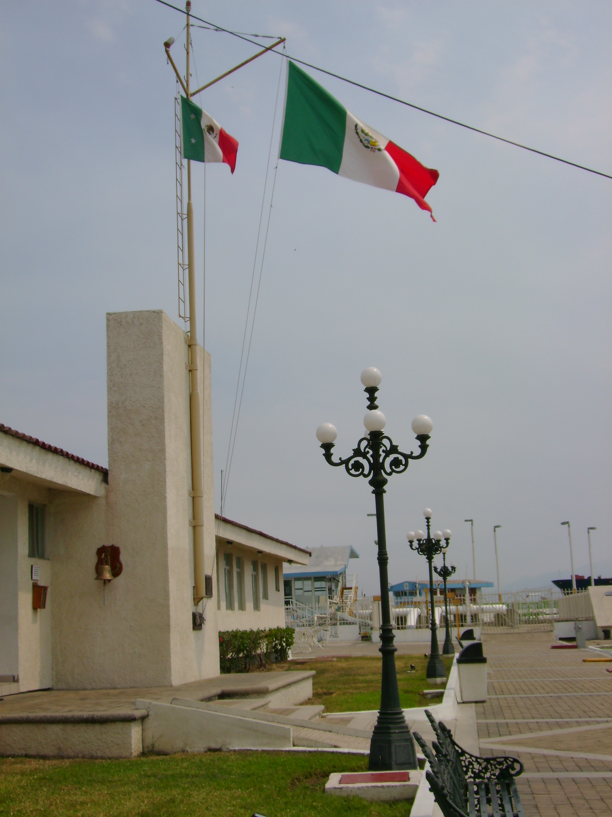 Mmemorial José Villalpando Rascón